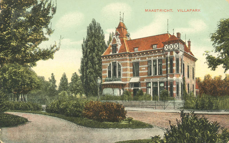 Zicht naar het zuidoosten op Villa Maya aan het voormalige rond-point op de kruising van de Prins Bisschopsingel en de Sint Lambertuslaan in het Villapark te Maastricht omstreeks 1930. Villa Maya (Sint Lambertuslaan 9) werd in 1903 gebouwd voor de fabrikant Seydlitz, later bewoond door burgemeester Michiels van Kessenich. Fotocollectie RHCL Maastricht, GAM 3838.